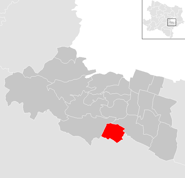 Bezirk Mödling